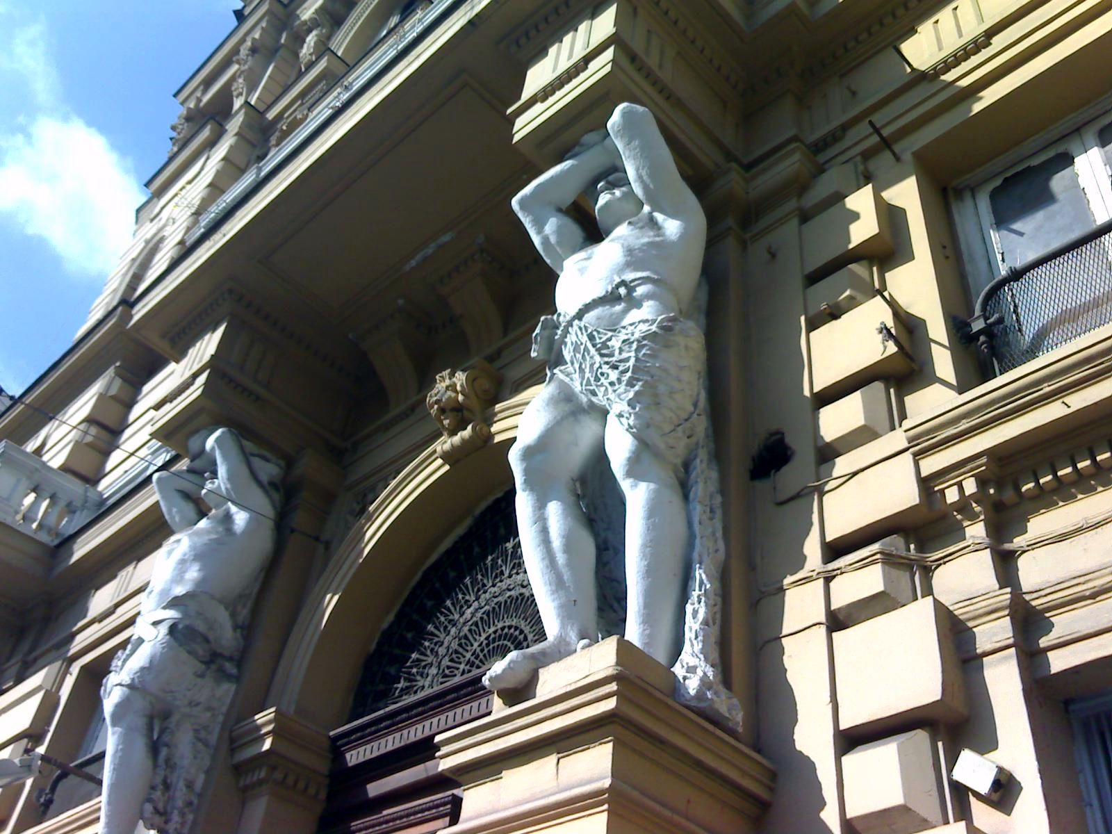 Particolare dei telamoni in uno dei quattro palazzi di Piazza Nicola Amore (Napoli)